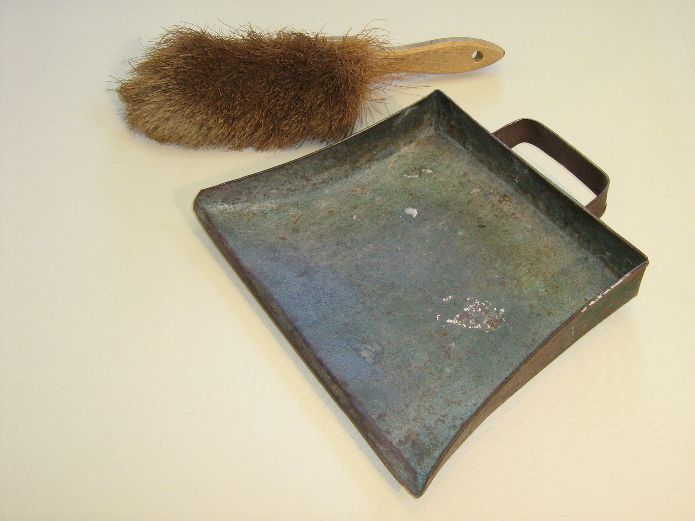 Broom and metal dust collector. (NL: Stoffer en blik, met een metalen blik)